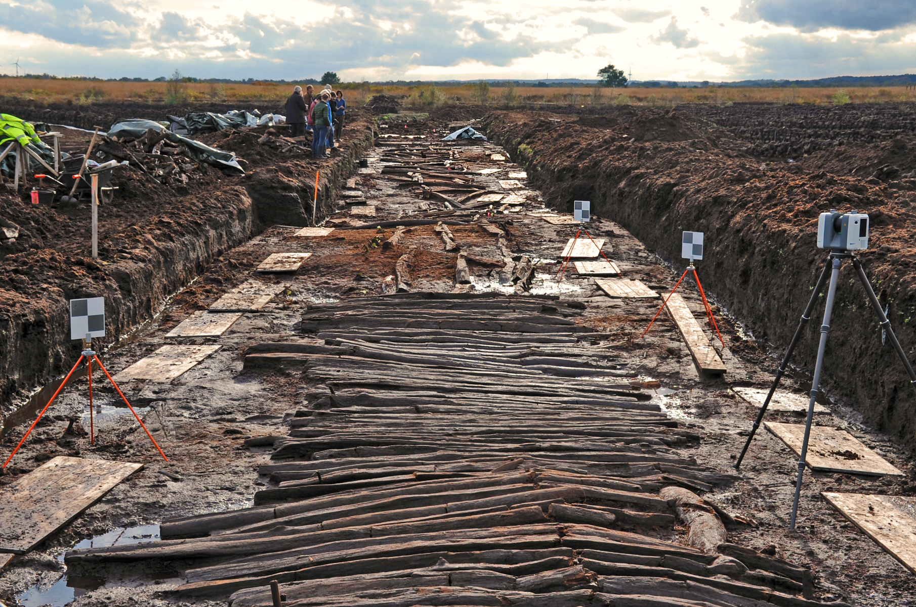 Moorweg im Aschener Moor, Besuch der Ausgrabung durch den niedersächsischen Wissenschaftsminister Björn Thümler